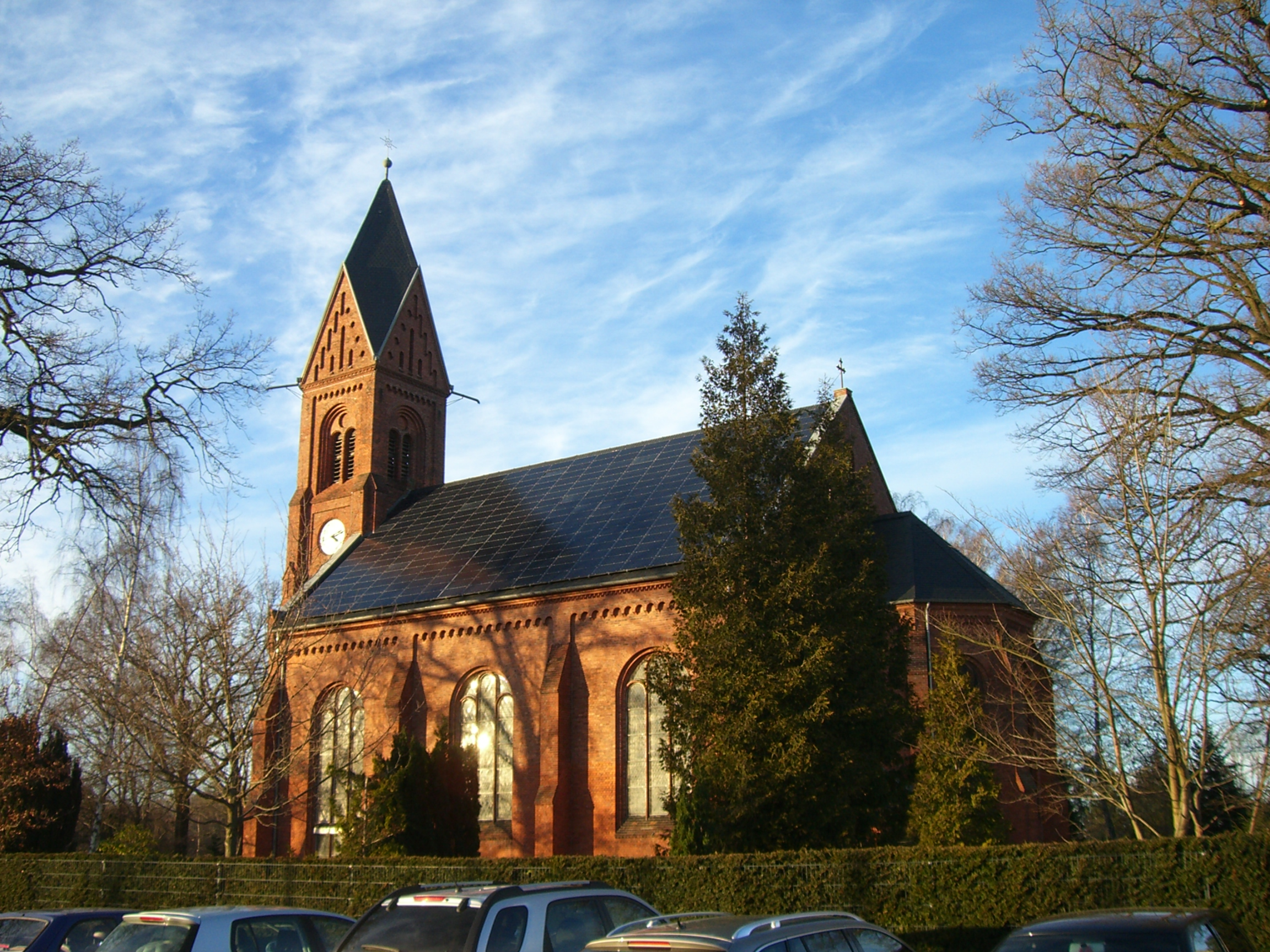 Kirche im Greifswalder Ortsteil Wieck.